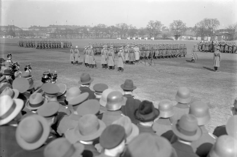 Parade der Wachtruppen vor dem Reichspräsidenten in Berlin ! Reichspräsident von Hindenburg in Generalfeldmarschallsuniform schreitet die Front der Wachtruppen in Berlin ab. Neben ihm der Kommandeur der Wachtruppen und Chef der Reichswehr General von Hammerstein.